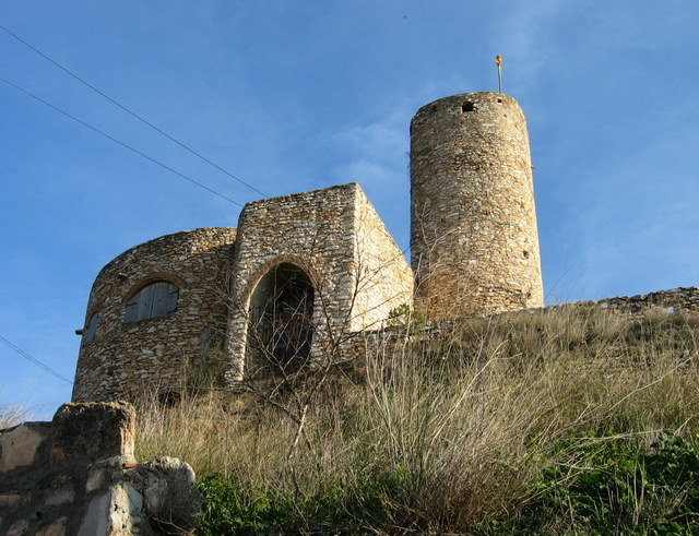 Castell de Vila-rodona a la comarca de l'Alt Camp - Catalunya